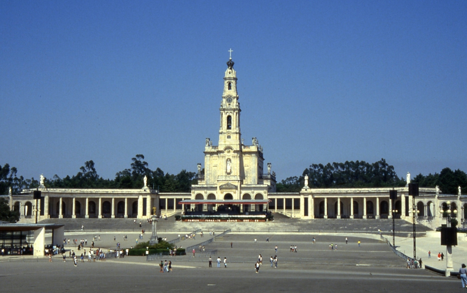 FatimaPortugal1994